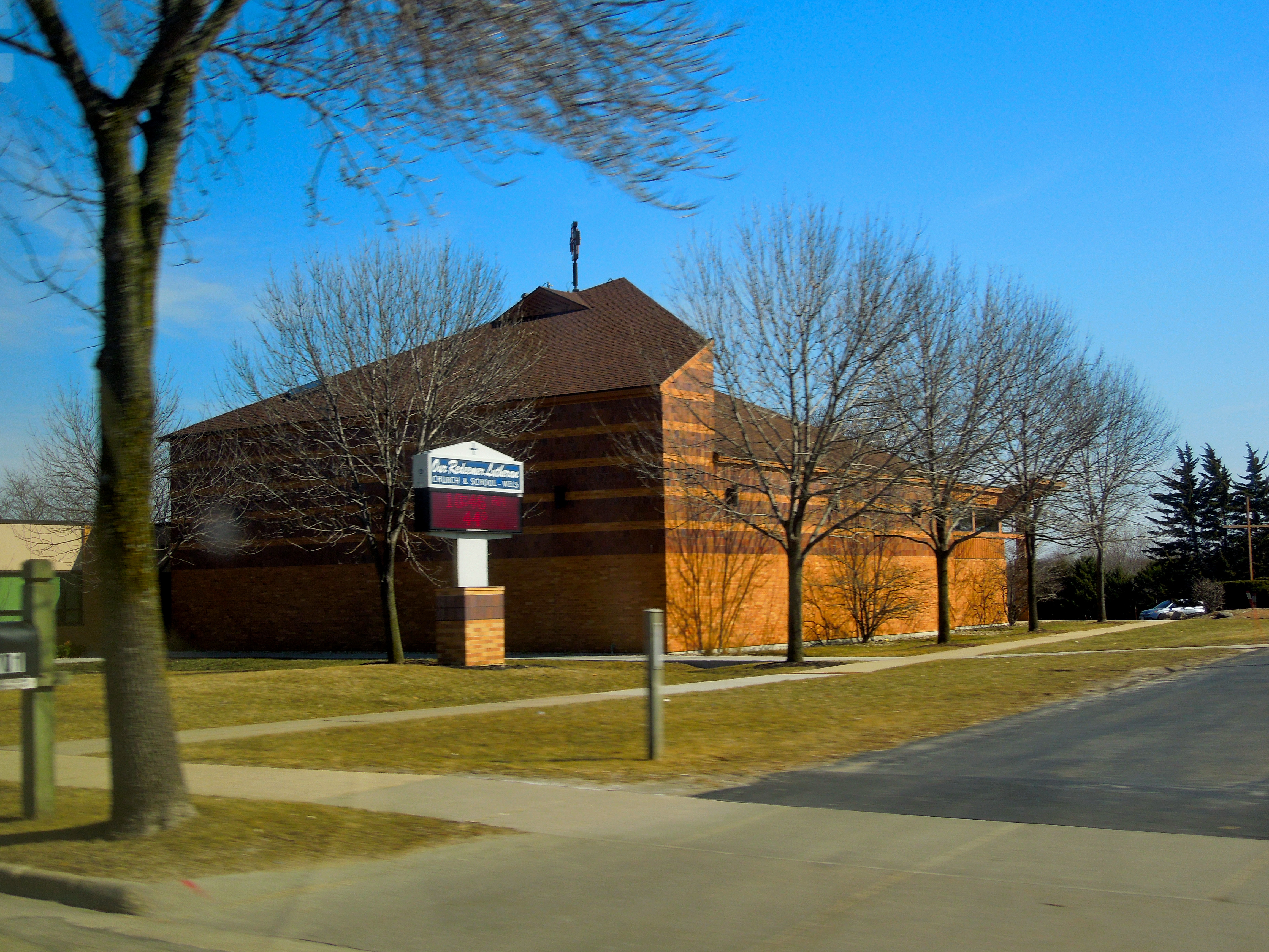 Our Redeemer Lutheran Church Madison, WI